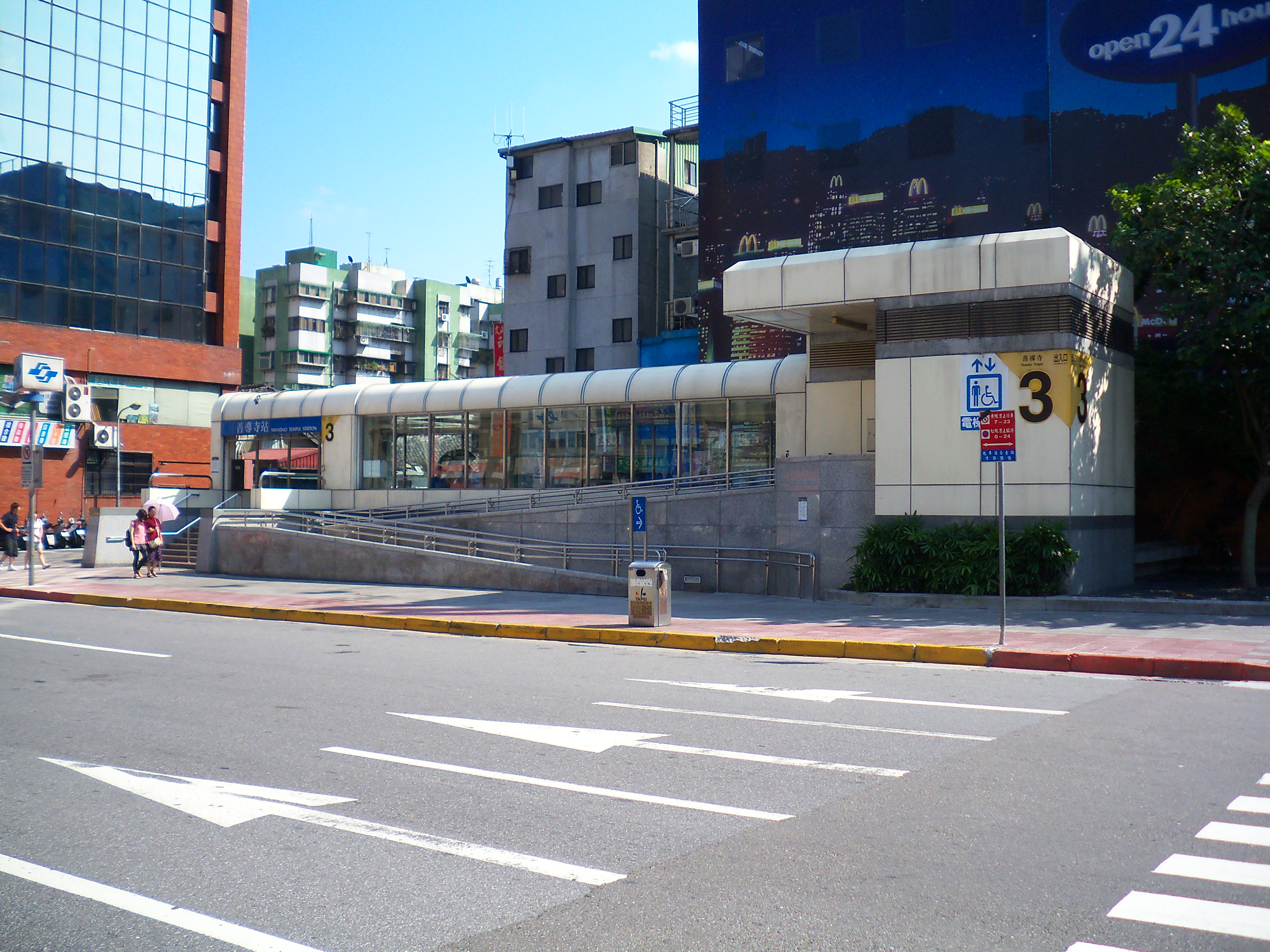 台北捷運南港線善導寺駅の3号出口。